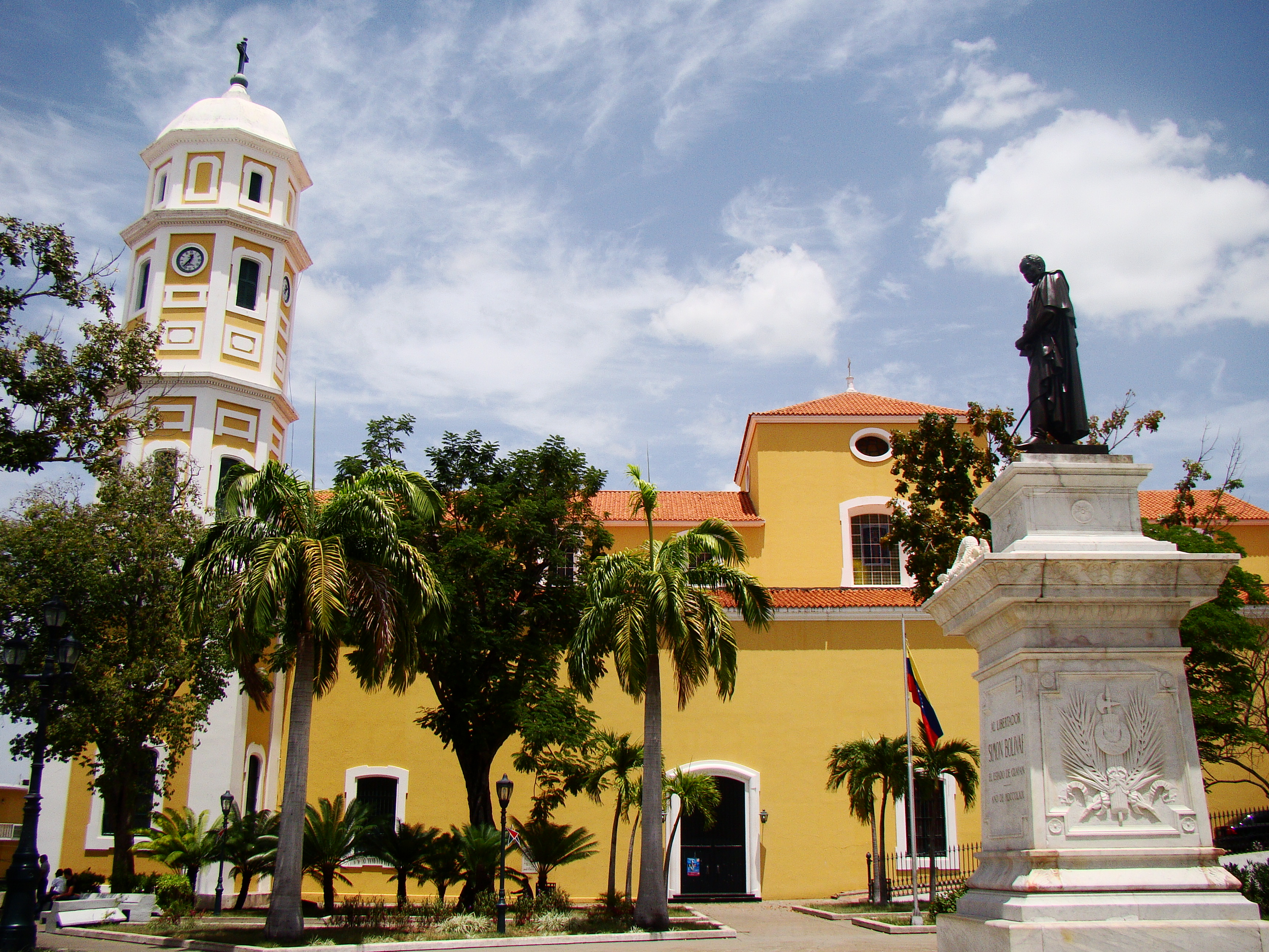 Una de las tantas plazas Bolívar que tiene Venezuela. Esta, la de Ciudad Bolívar, tiene mucho color